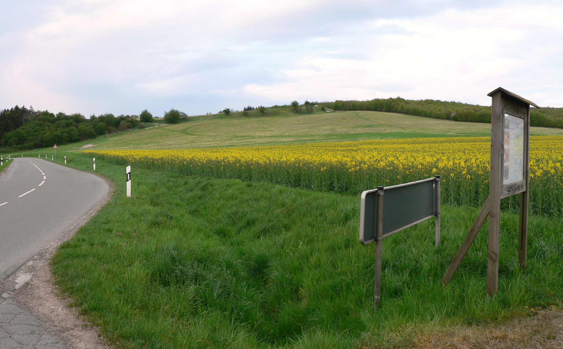 Hünenburg bei Watenstedt von unterhalb gelegenem Parkplatz mit Infotafel zur Hünenburg gesehen